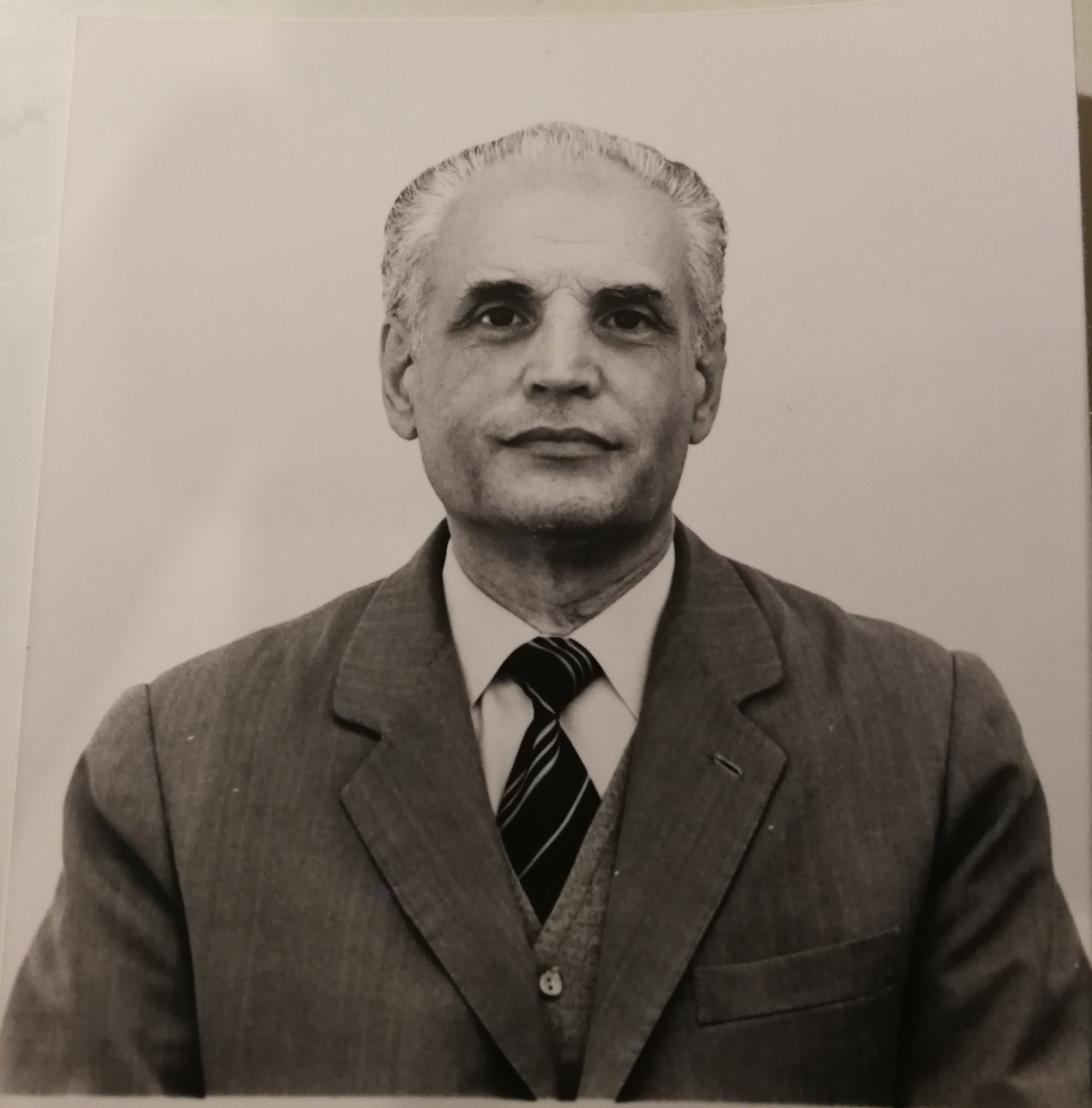 ritratto fotorafico di Amato Novelli